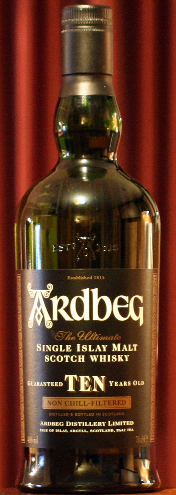 Ardbeg Single Islay Malt Scotch Whisky 10 years old